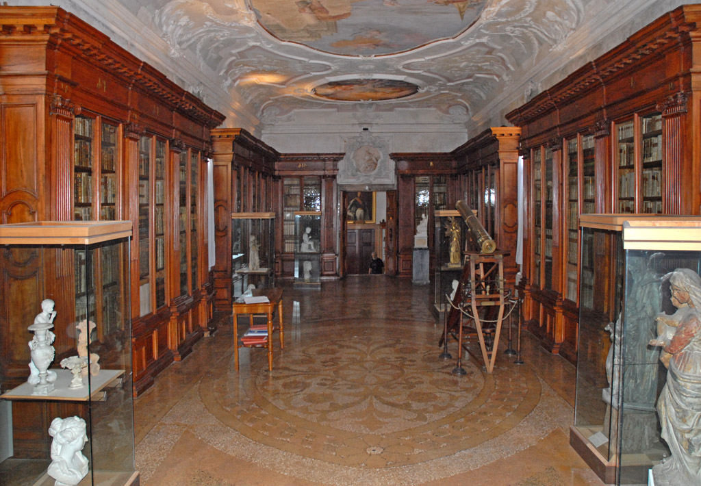 San Lazzaro degli Armeni est une petite île de la lagune de Venise, très proche du Lido. Elle est occupée par un monastère de l'ordre des Mékhitaristes depuis 1717. Le monastère comprend une bibliothèque de 200.000 volumes et manuscrits, un musée, une église, un cloître, des jardins et divers bâtiments. Ordre religieux arménien catholique fondé à Constantinople en 1700, établi en 1703 en Morée (Grèce) alors sous domination vénitienne par l’abbé Mekhitar de Sebaste (auj. Sivas) (1676 Sebaste-1749 Venise). En 1715, les mékhitaristes s’exilent à la suite de la conquête turque et s’établissent à Venise où, en 1717, la République sérénissime leur offre résidence sur l’île de San Lazzaro. De règle bénédictine, Mekhitar s’applique à donner à ses disciples un haut niveau d’éducation, portant une attention particulière au riche héritage culturel arménien. Il développe une intense activité d’édition. La branche autrichienne de l’Ordre reconnue à Trieste en 1773, puis déplacée à Vienne (Autriche) par Napoléon en 1810 est également dotée d’une maison d’édition. En 2000, Venise et Vienne ont fusionné, coïncidant avec le 300e anniversaire de l’Ordre, le 2000e anniversaire du christianisme et le 1700e anniversaire de l’adoption du christianisme par l’Arménie comme religion d’Etat. voir aussi le site sur les diasporas arméniennes